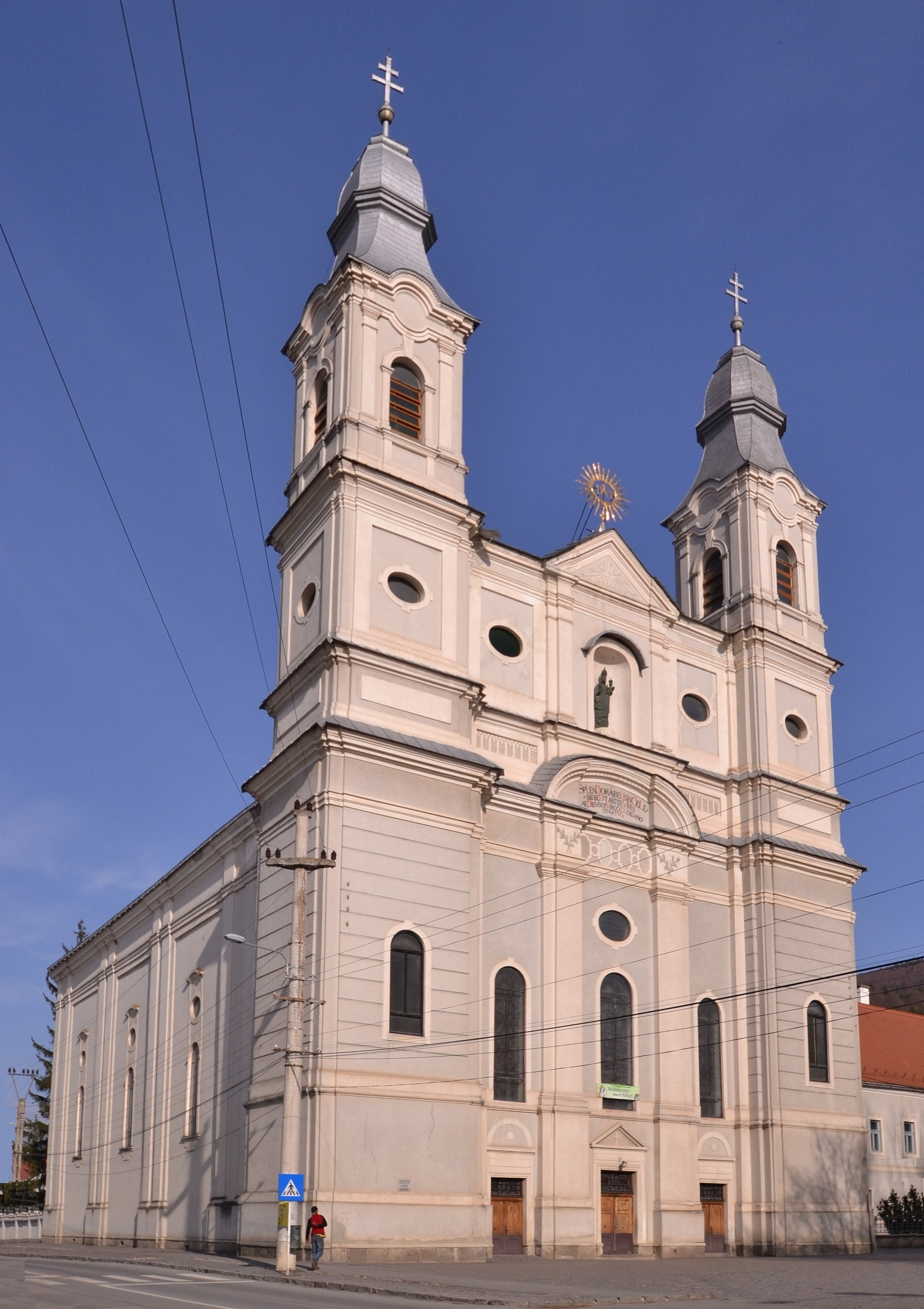 Csíksomlyói templom